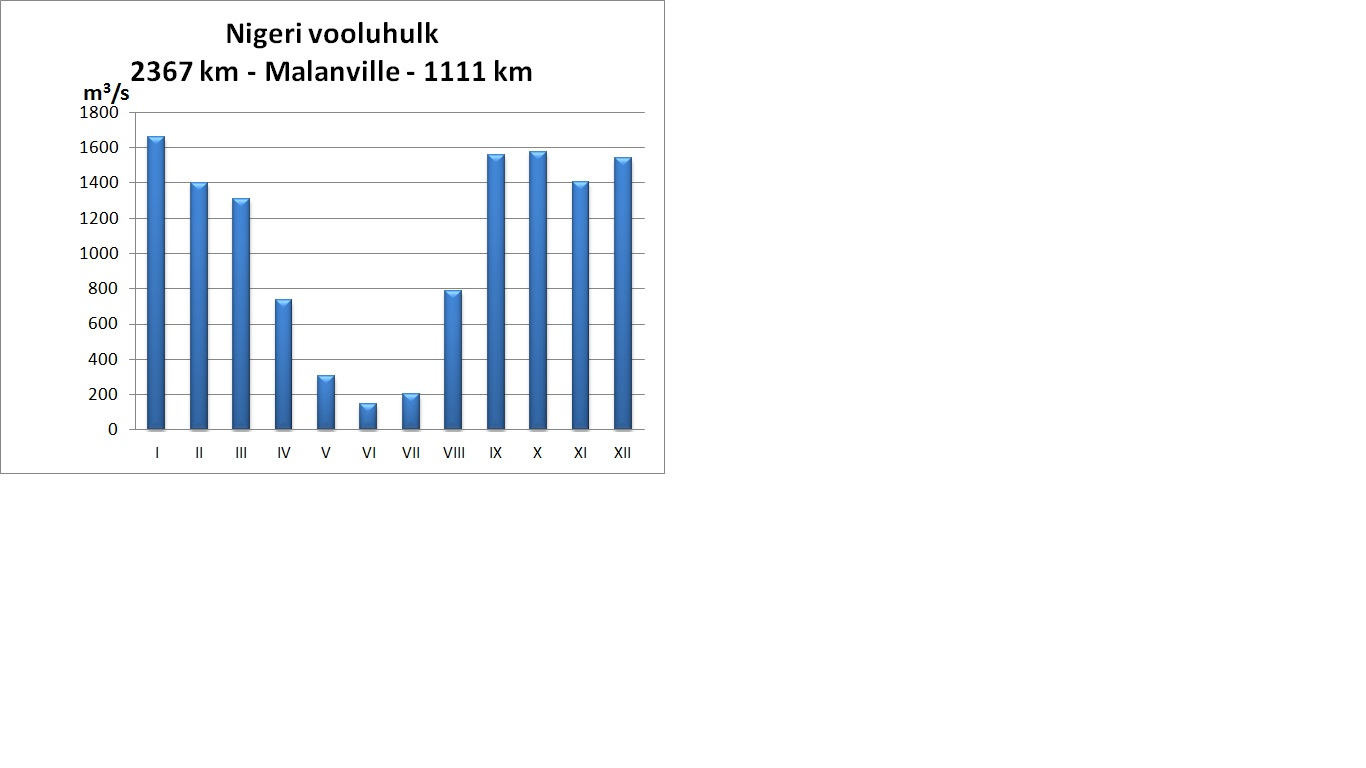 Nigeri jõe vooluhulk Malanville jama andemete järgi